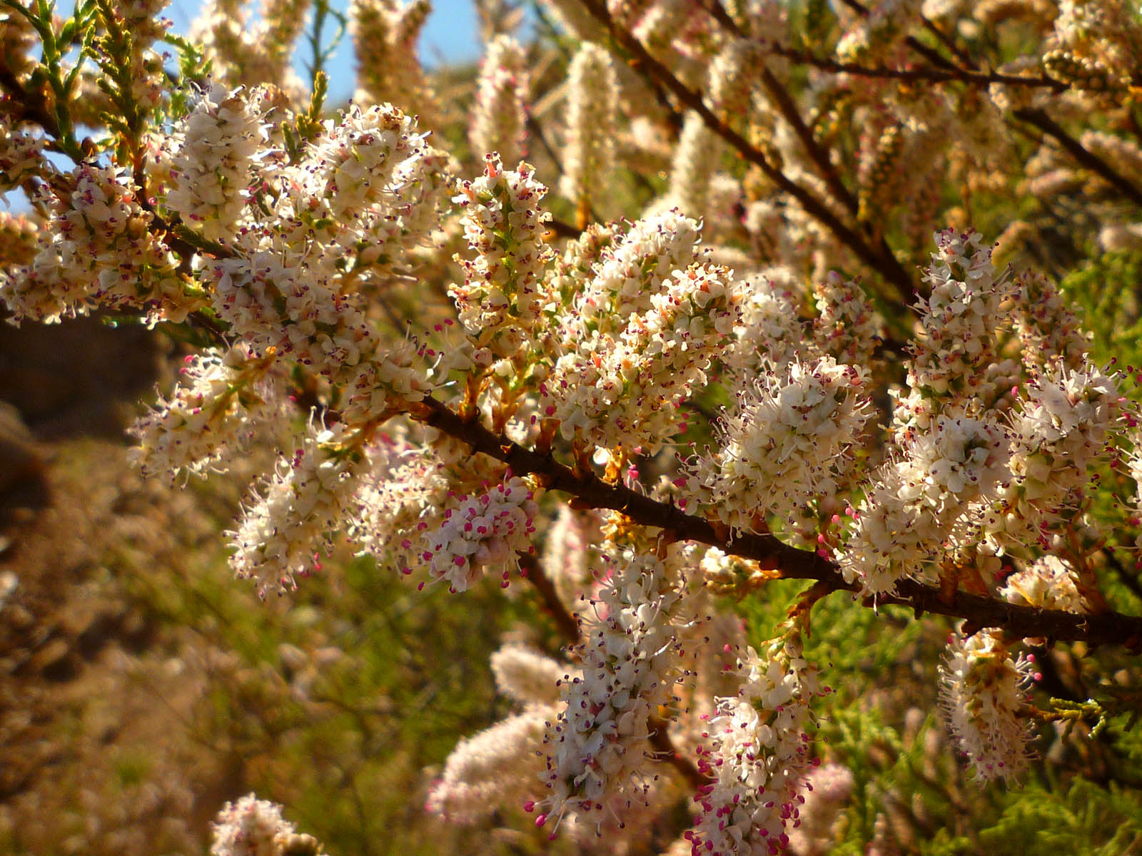 Taray (Tamarix boveana) en Portmán, España.